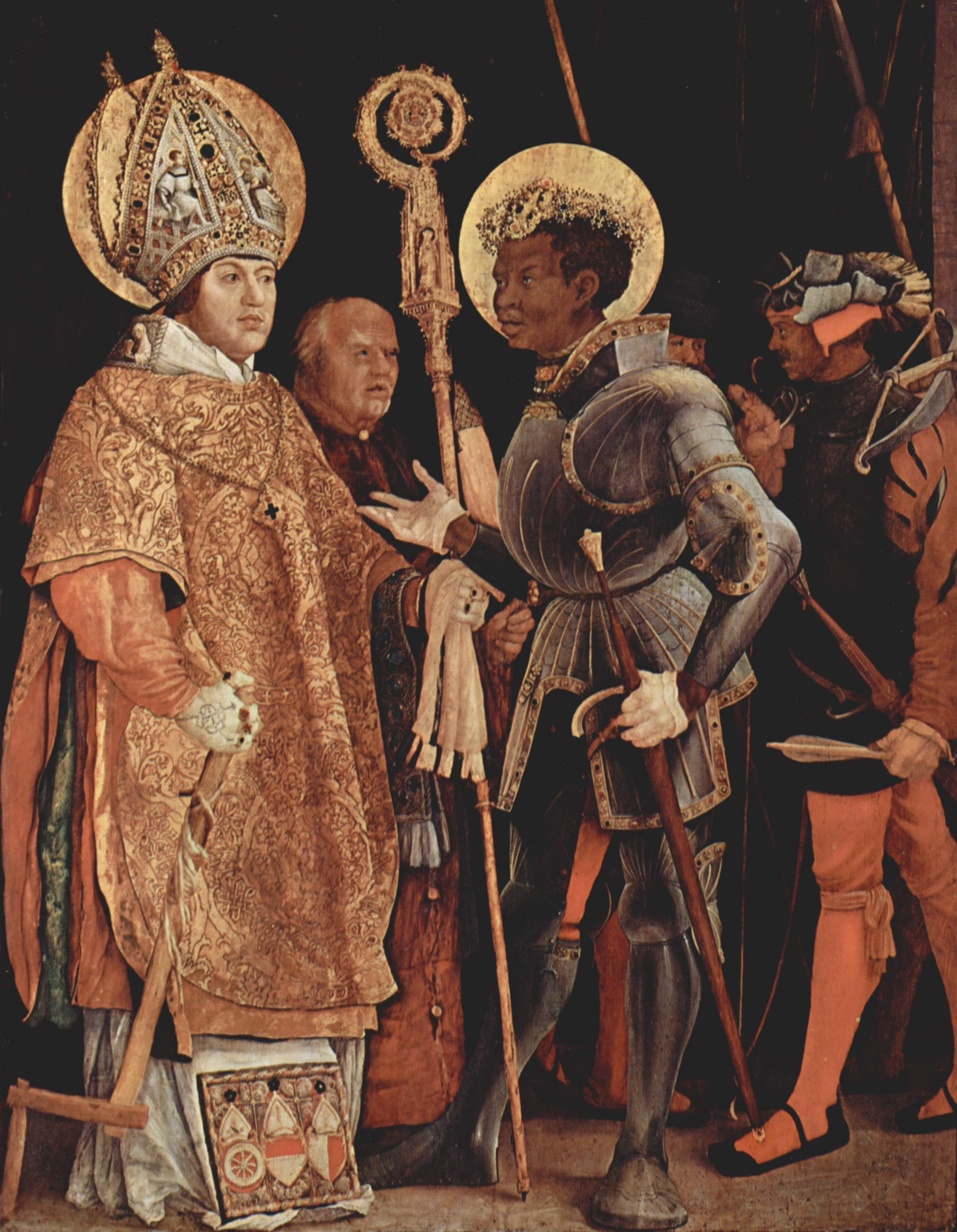 Begegnung des hl. Märtyrers Mauritius, des Anführers der thebaischen Legion, mit dem hl. Erasmus. Der hl. Mauritius war Patron des Stiftes und des Heiligen Römischen Reiches, der hl. Erasmus Patron des fürstlichen Hauses, dem Albrecht von Brandenburg entstammte. Erasmus trägt die Porträtzüge des Auftraggebers